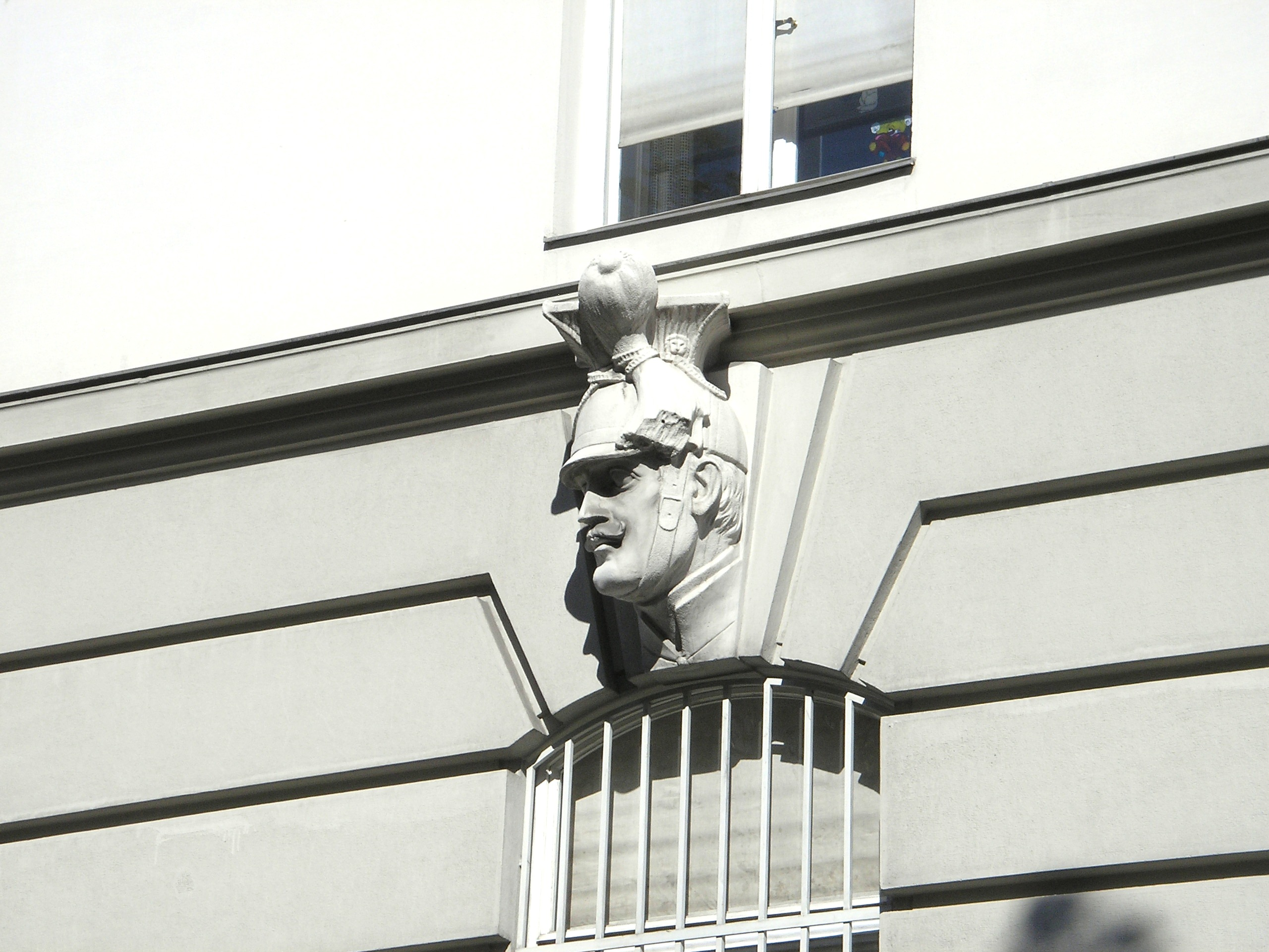 The Regierungsgebäude in Vienna, the former Imperial and Royal Ministry of War (Kriegsministerium).